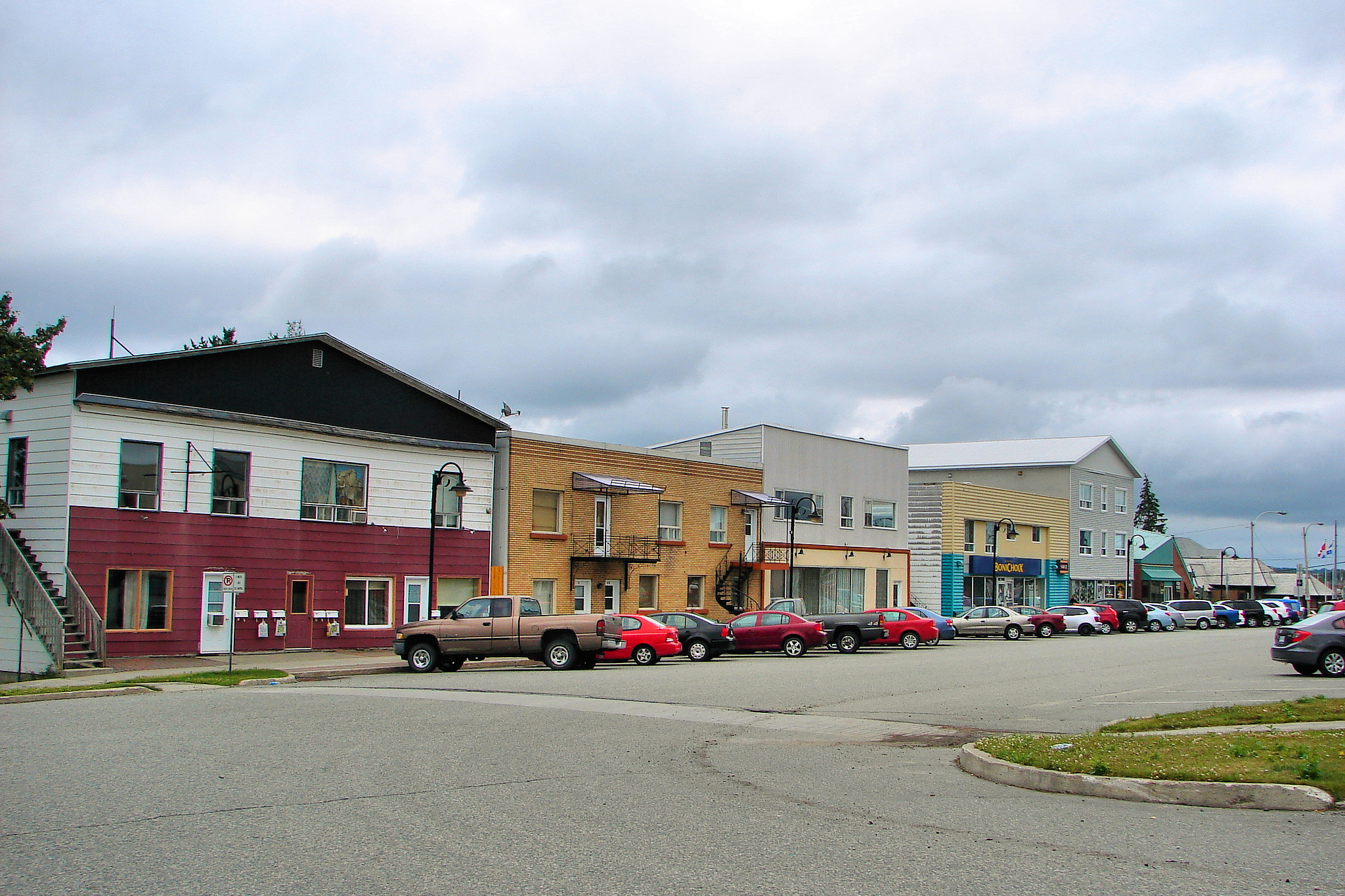 Macamic, Quebec, Canada